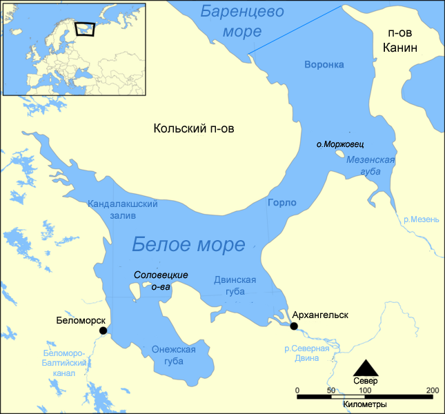 Карта Белого моря